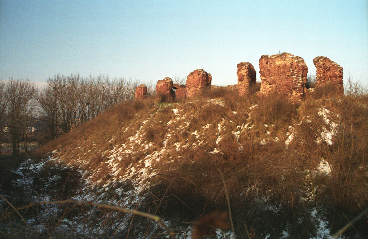 Sochaczew